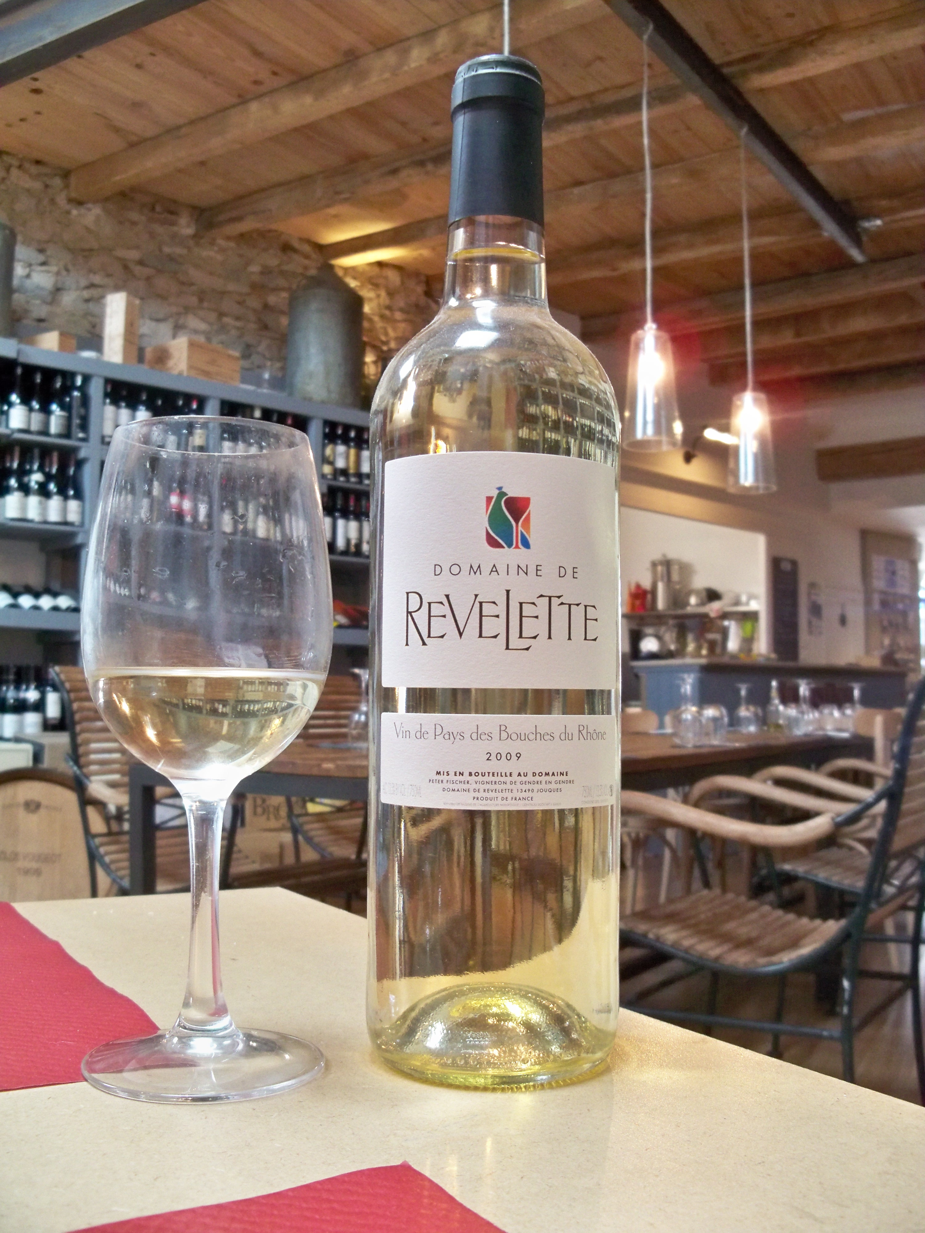 Bouteille de Vin de Pays des Bouches du Rhône